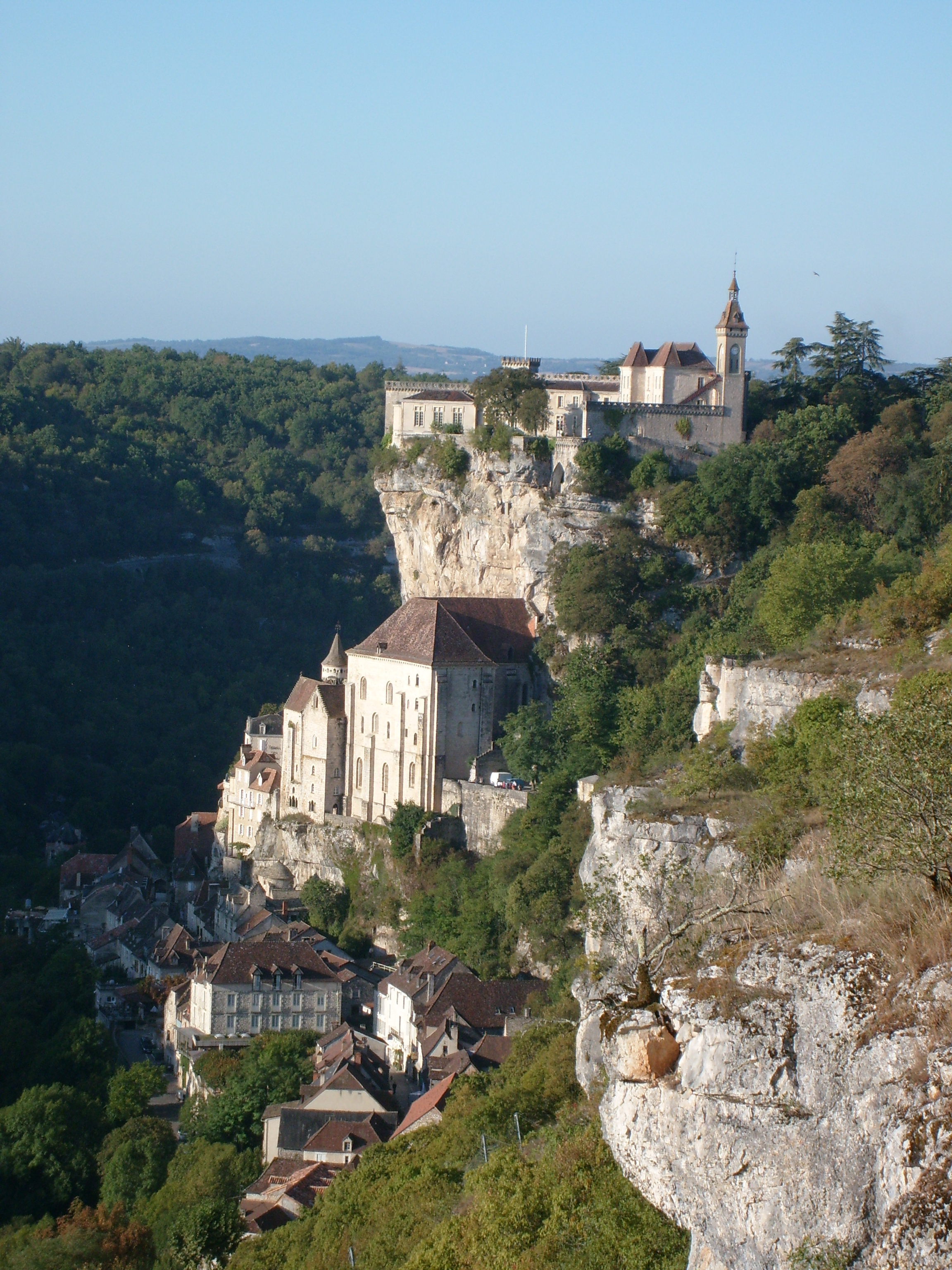 Le village de Rocamadour, à flanc de montagne dans le Périgord.